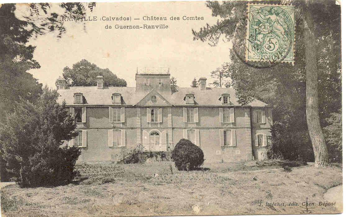 Carte postale timbrée du Château de Guernon-Ranville au début du XX